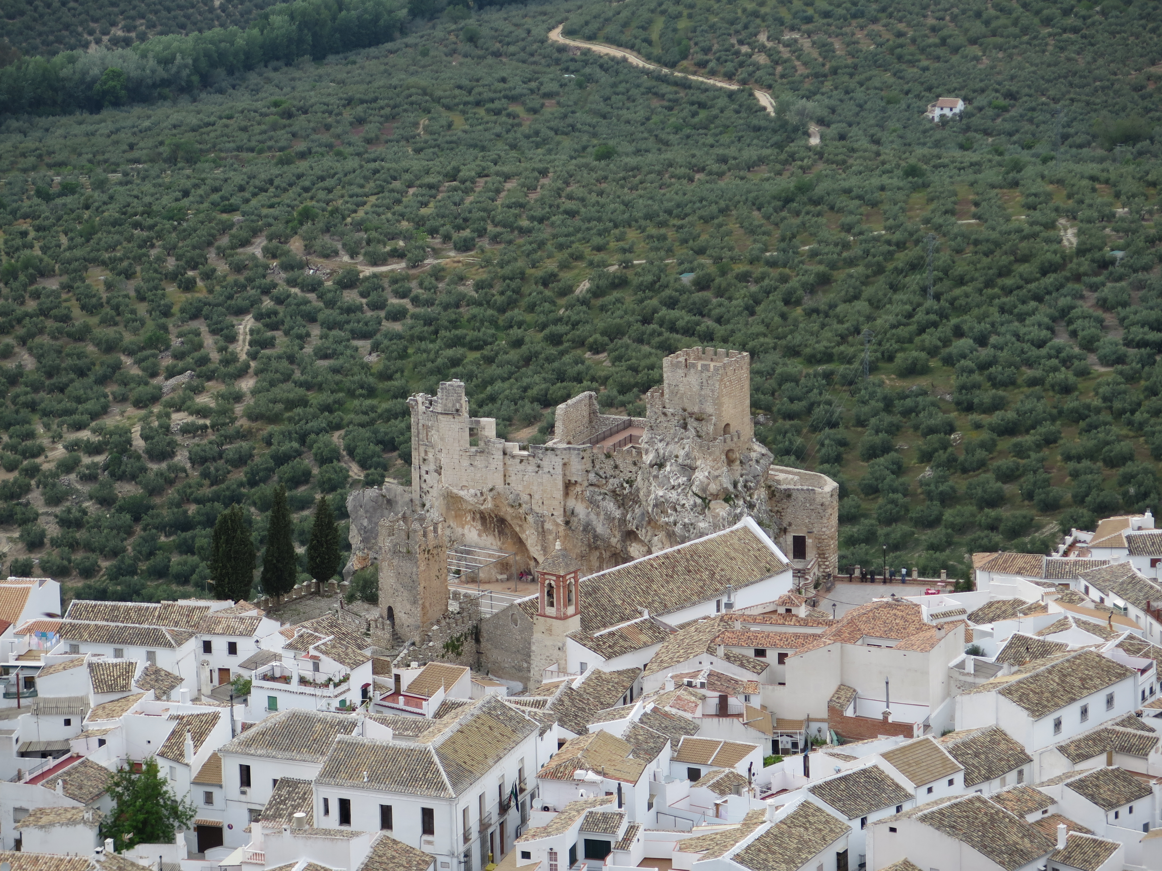 Vista del castillo de Zuheros, provincia de Córdoba.